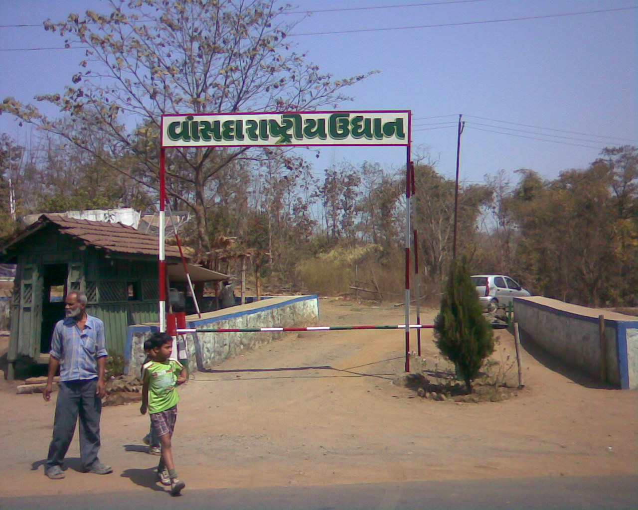 ગુજરાતી: It is my own work. , શ્રેણી:ગુજરાતના અભયારણ્યો શ્રેણી:નવસારી જિલ્લો